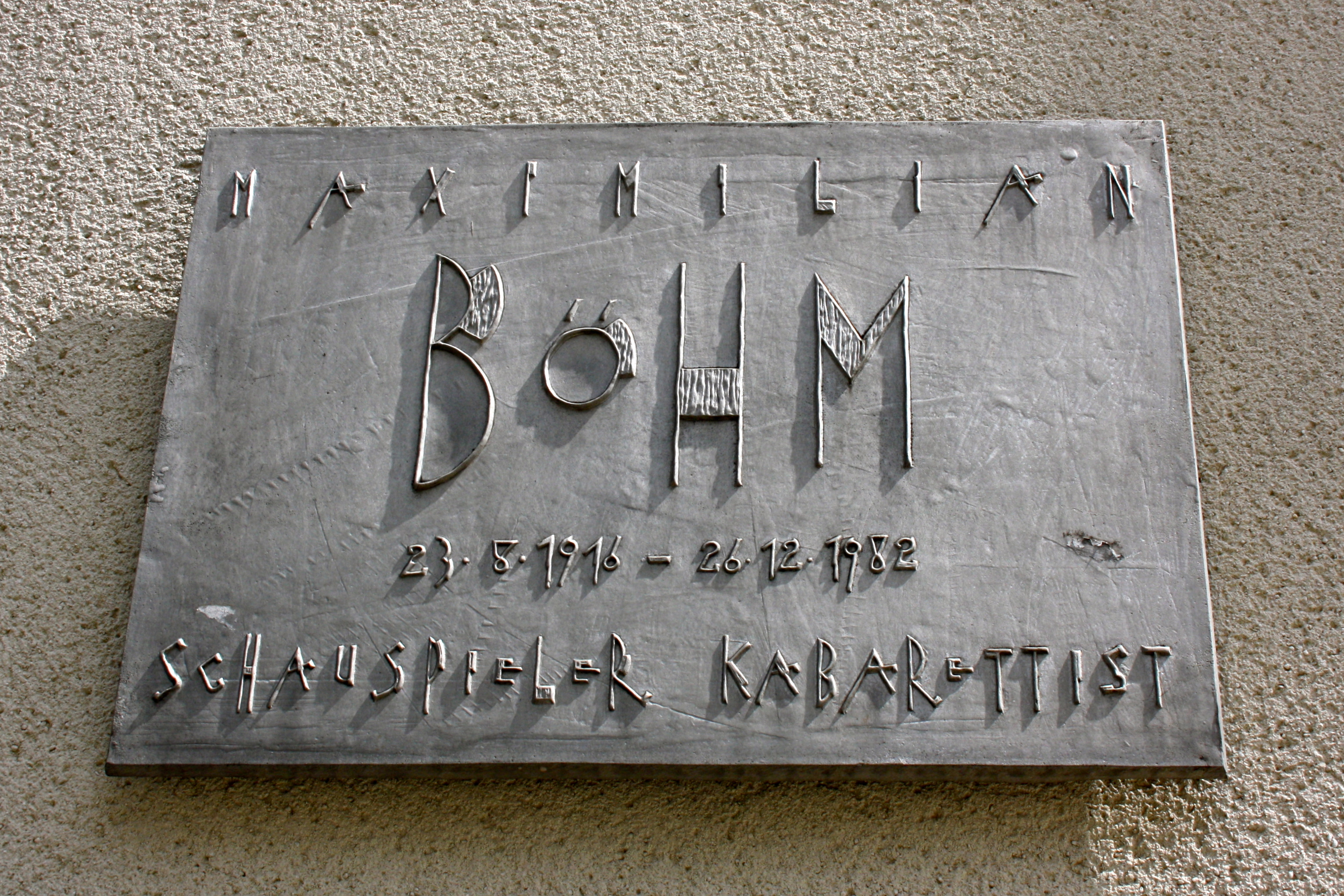 Widmungstafel an Max Böhm von Johann Jascha am Max-Böhm-Hof in Wien-Josefstadt. This media shows the Vienna residential building (Gemeindebau) with the ID 294 (Max-Böhm-Hof).